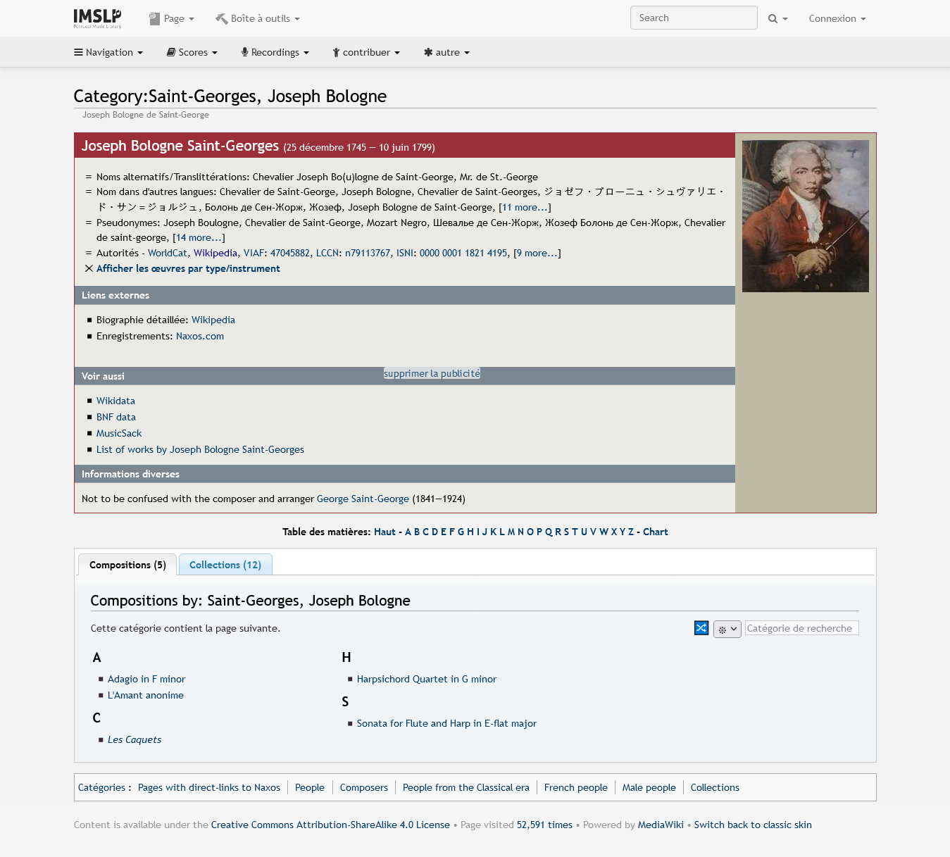 Liste des partitions de Joseph Bologne de Saint-George sur le wiki IMSLP Petrucci Music Library. Capture d'écran de la page Category:Saint-Georges, Joseph Bologne.